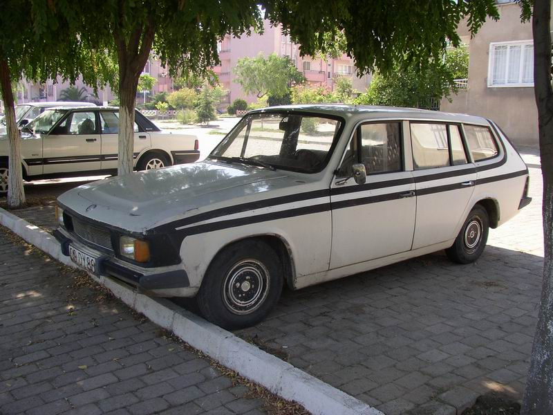 Türkiye'de seri olarak üretilen ilk otomobil markası Anadol'dan bir görünüm.